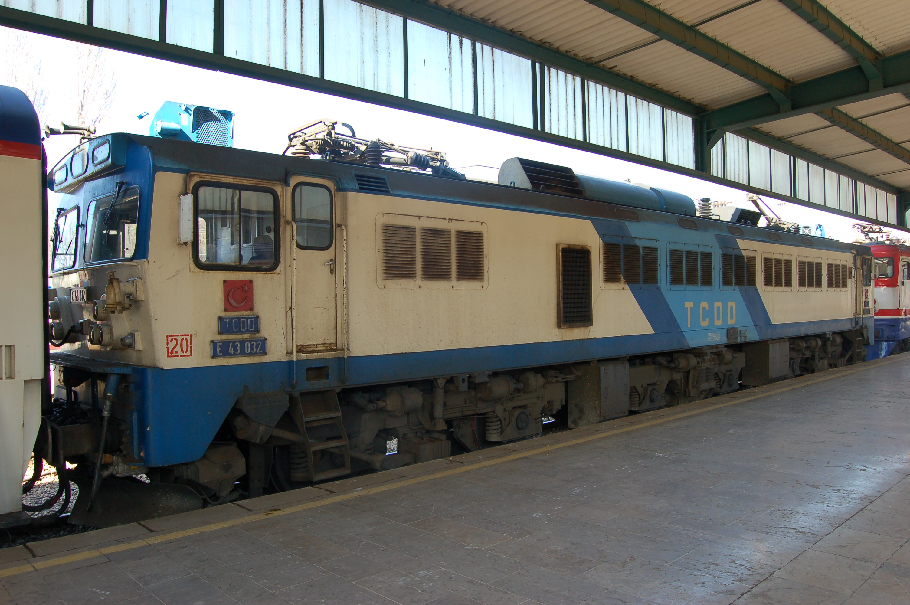 TCDD E43032 at Haydarpaşa, Istanbul, Turkey.